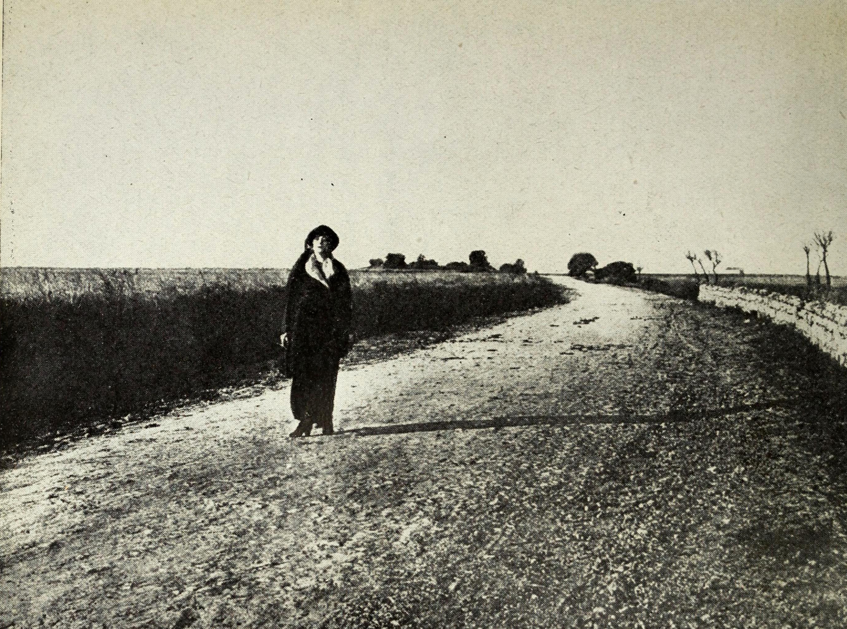 Photogramme du film